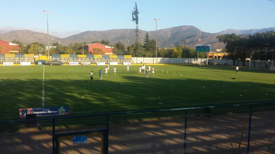 Partido entre Deportes Rengo y Thomas Greig por la Copa Absoluta 2015, en el Estadio Guillermo Guzmán Díaz de Rengo